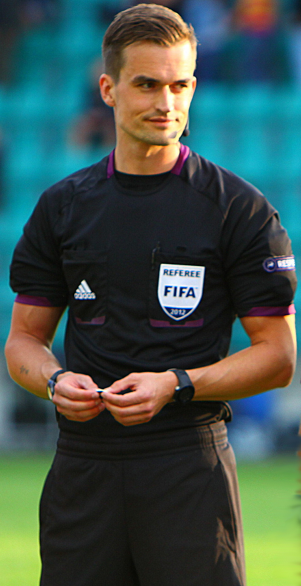 Kenn Hansen danish referee.